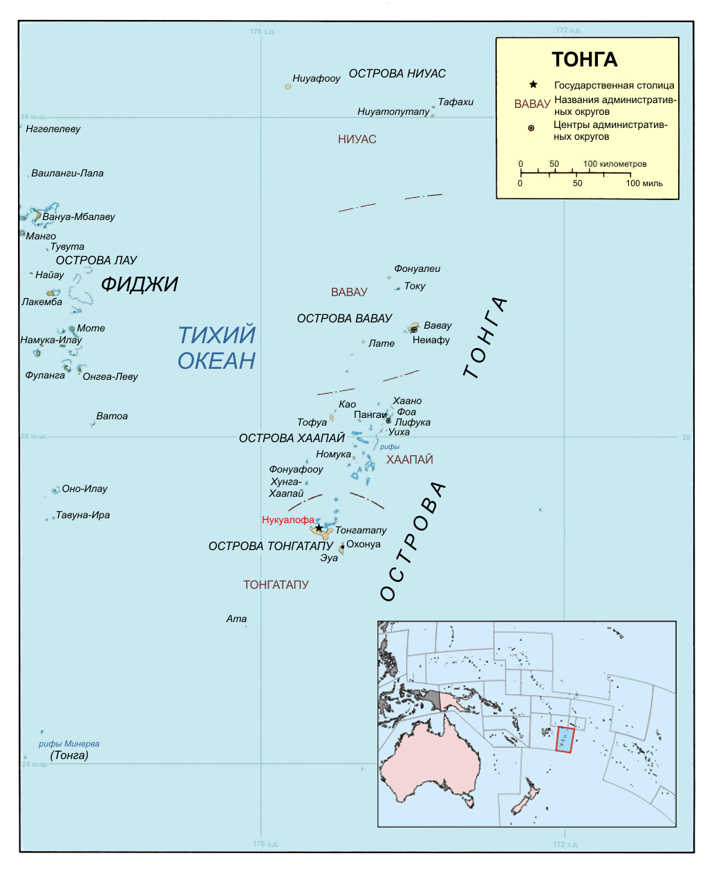 Карта Королевства Тонга на русском языке (с частью Республики Фиджи)